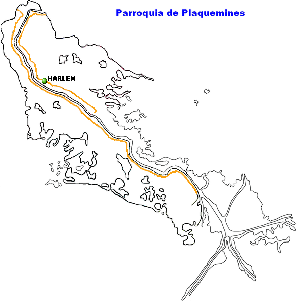 Harlem, Plaquemines Parish, Louisiana.